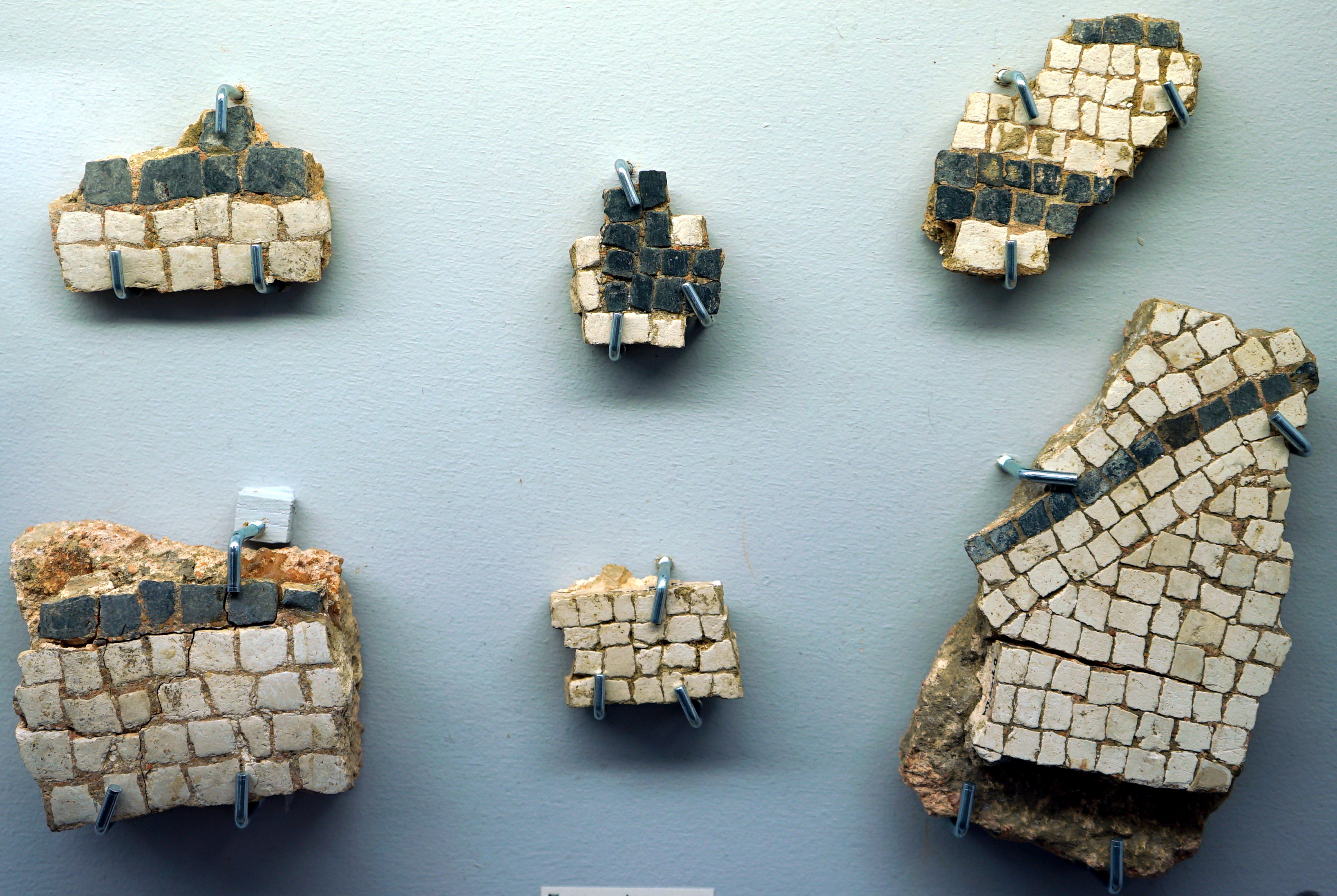 présenté au musée de toul.